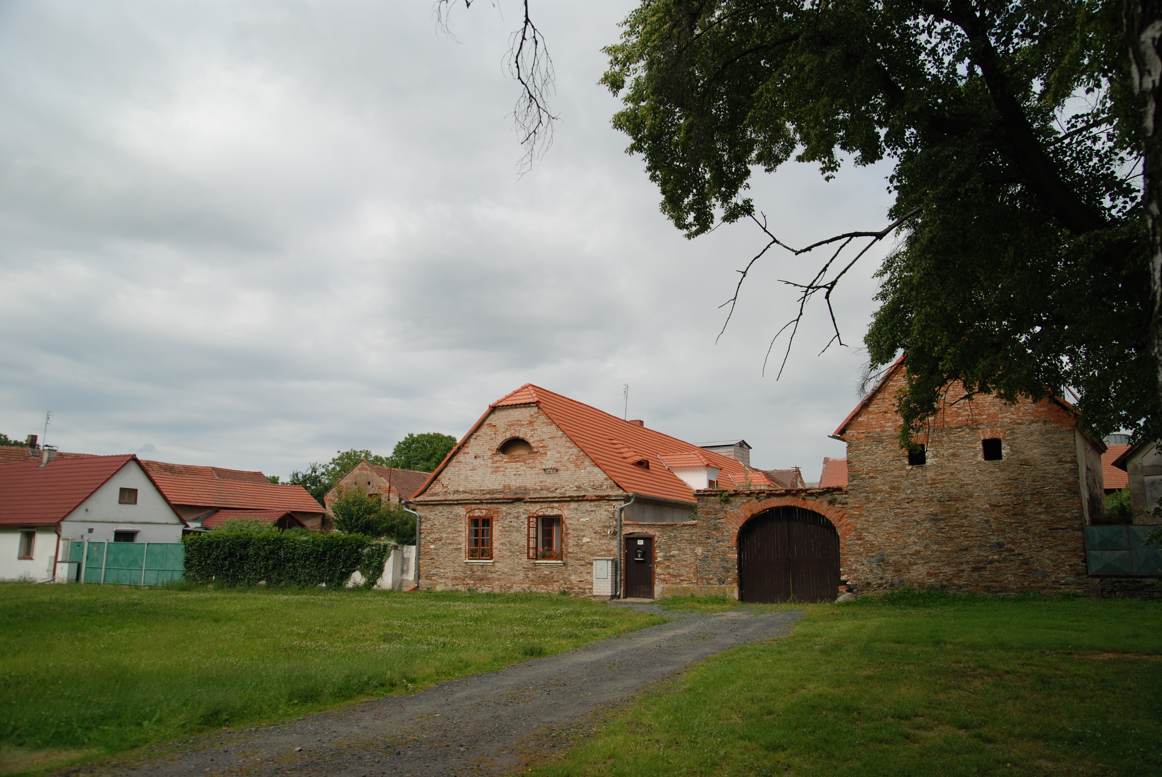 venkovská usedlost čp. 11 - kulturní památka, Potěhy